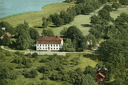 Ekhov gård i Björnlunda